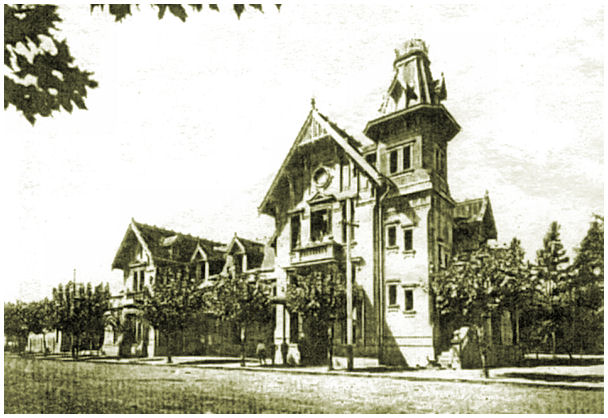 Ramos Mejía tran station of BA Western Railway.